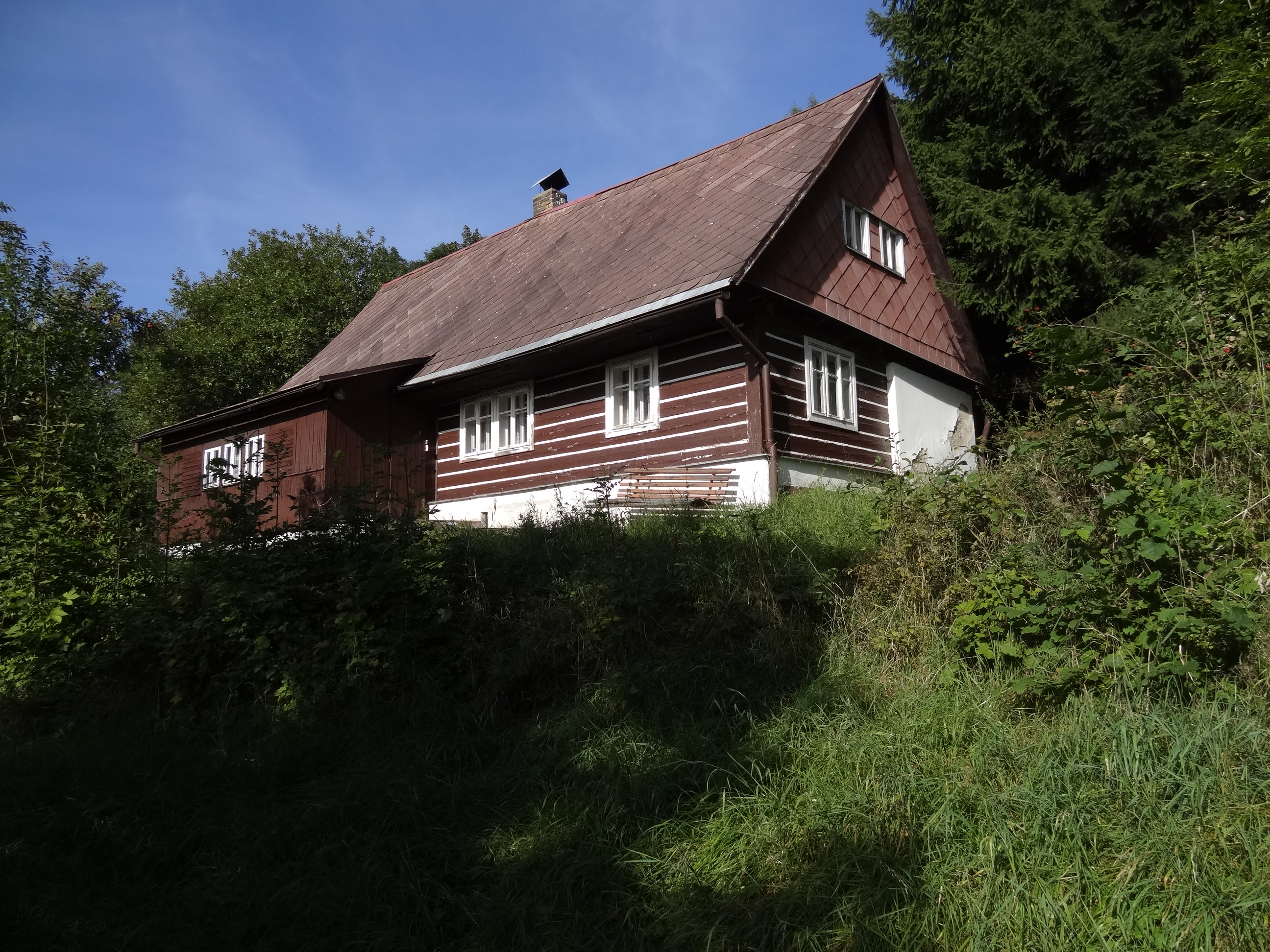 Žďárek (u Hodkovic nad Mohelkou) - če. 14